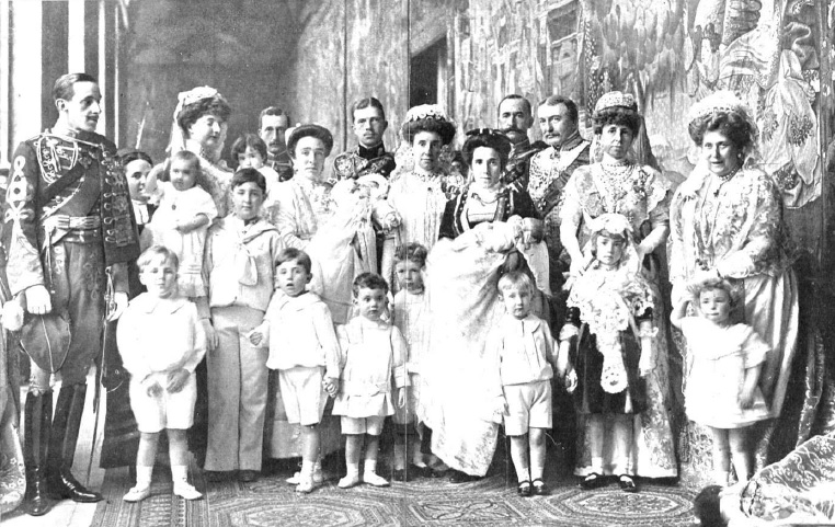 Fotografía de la familia real española durante el bautizo de la infanta María Cristina de Borbón y Battenberg. Está presente el embajador de Rusia en representación del zar.